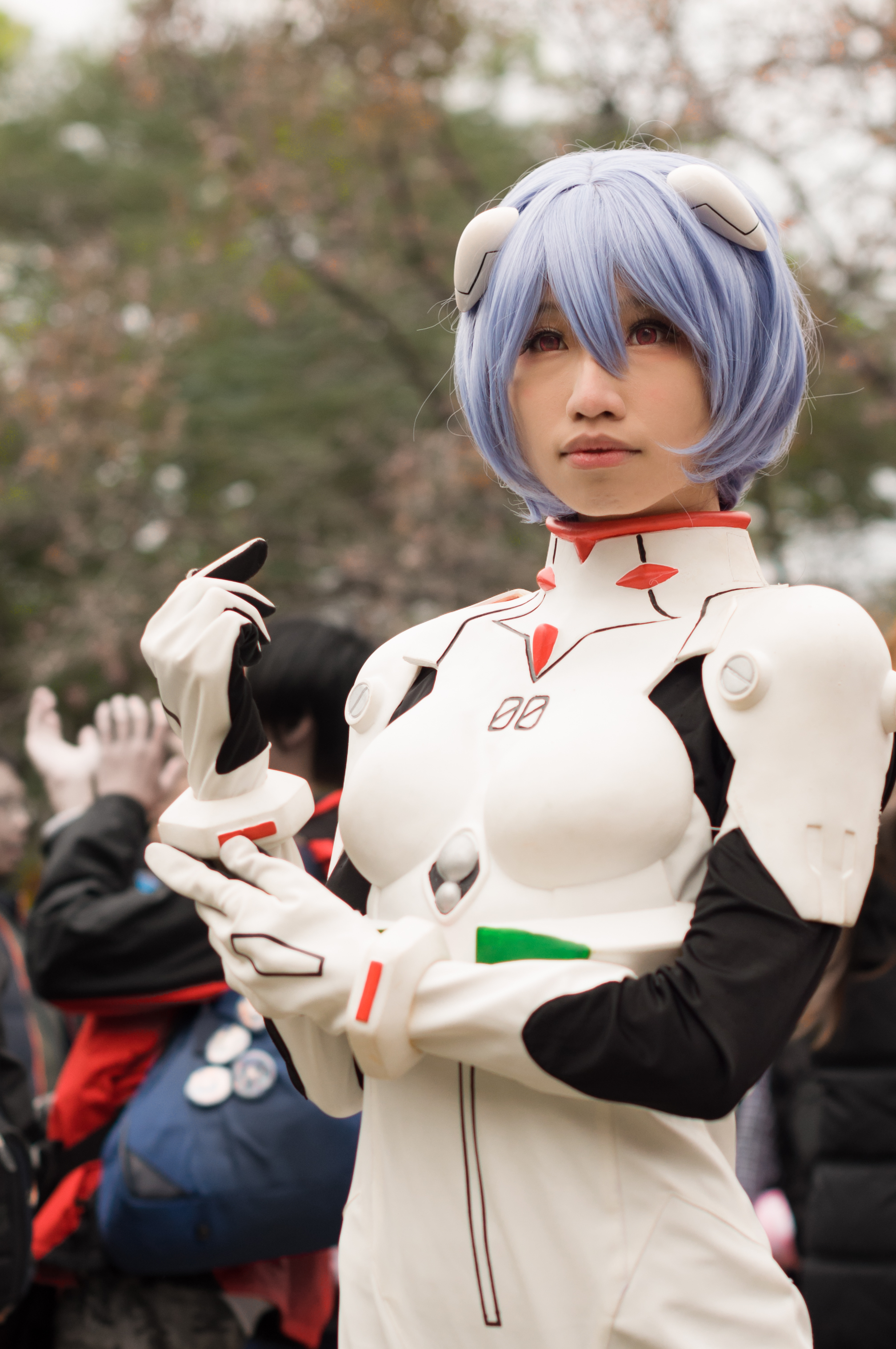 第29屆開拓動漫祭，《新世紀福音戰士》綾波零cosplayer。